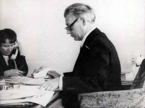 Вениамин Ларин в редакции газеты "Вечерняя Алма-Ата"